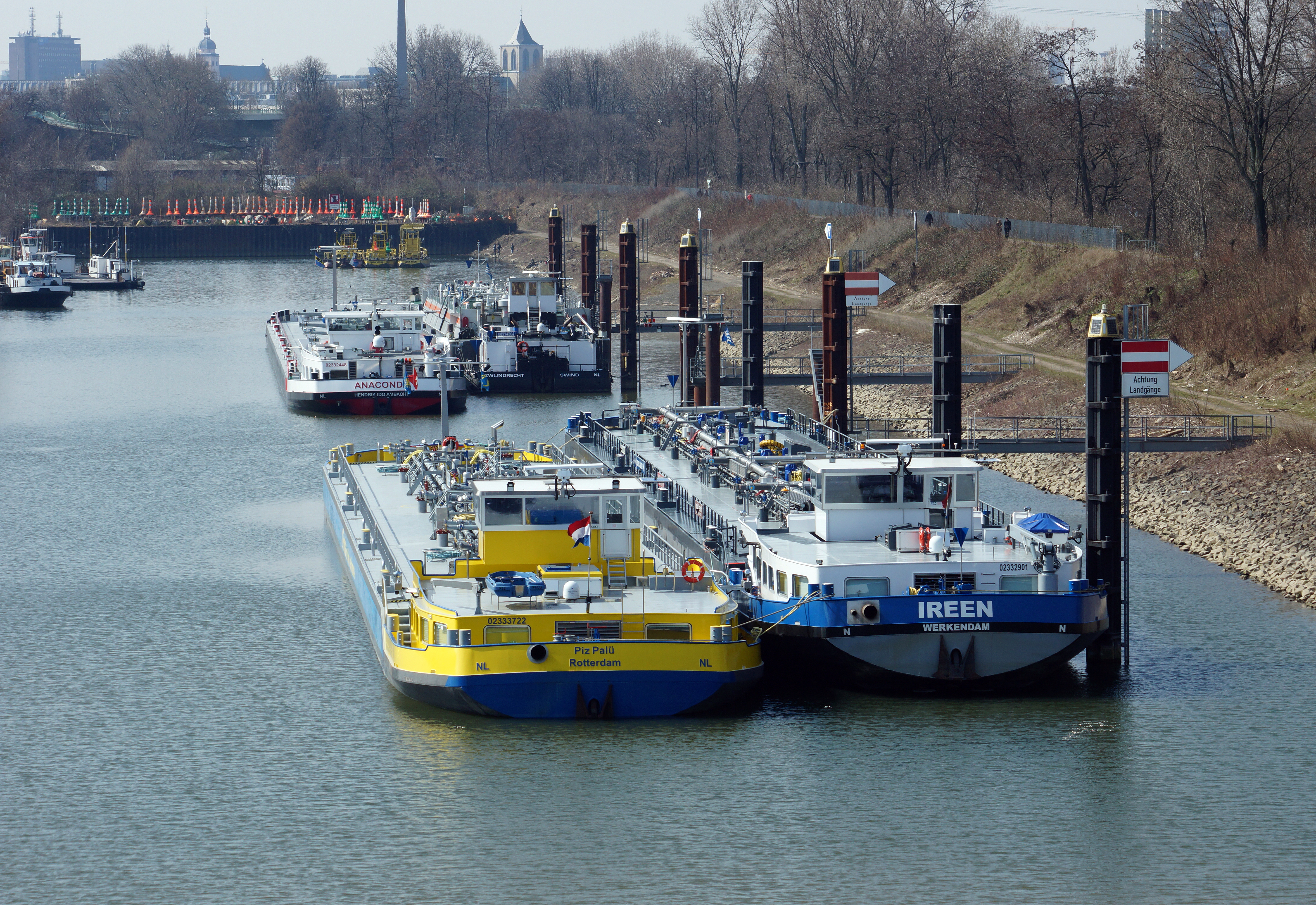 Blick von Norden in das rheinseitige Becken des Mülheimer Hafens in Köln. Am südlichen Ende erkennt man den Tonnenhof des Wasser- und Schifffahrtsamts Köln.